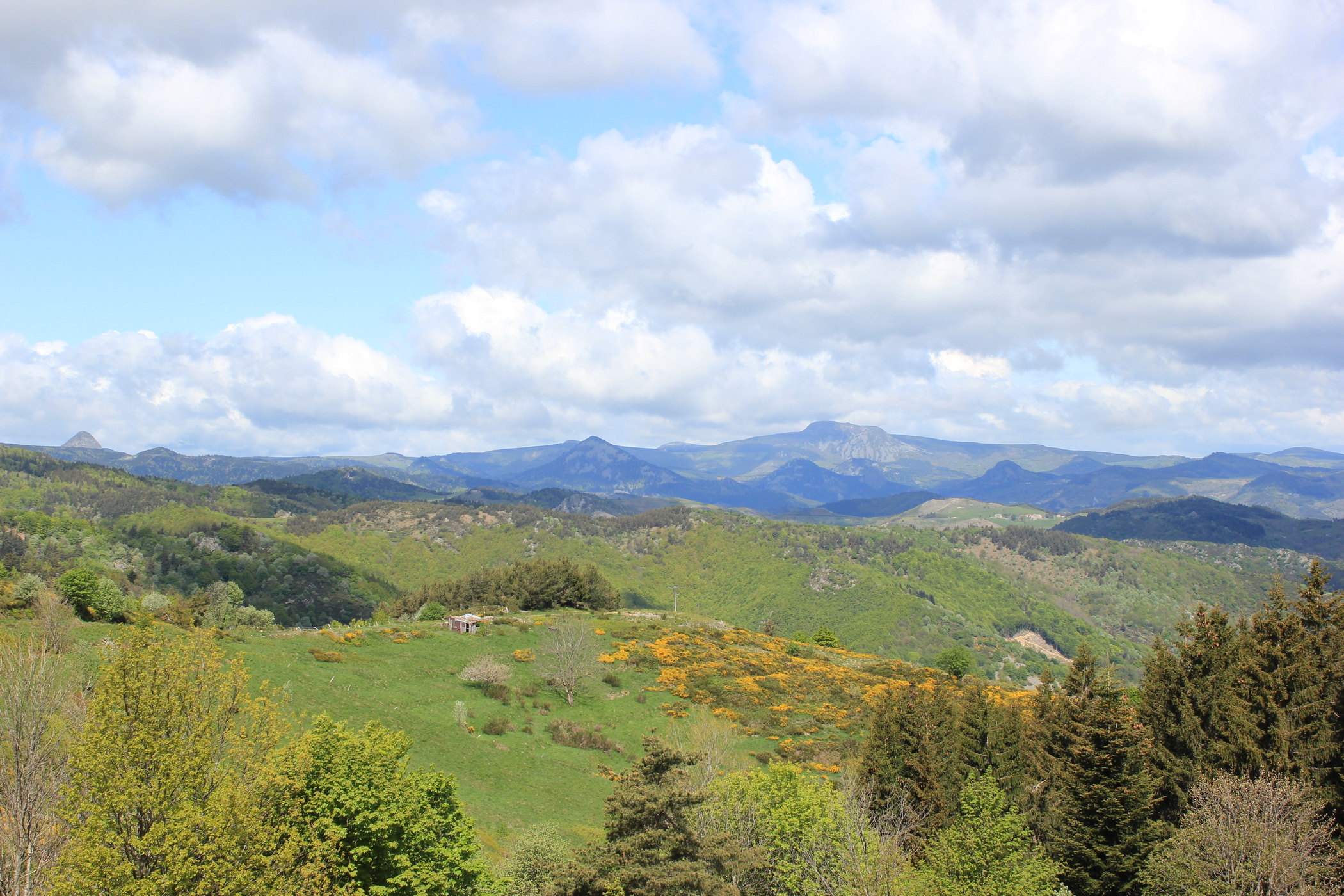 Ausblick von Mézilhac zum Mont Mézenc und dem Mont Gerbier-de-Jonc nach Nordwesten.